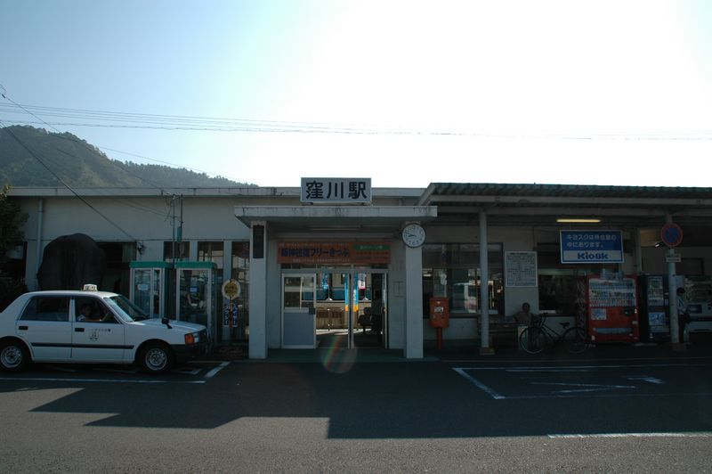 JR-Shikoku(JAPAN) Dosan-Line, Kubokawa Sta. photo by (2005.9.19)